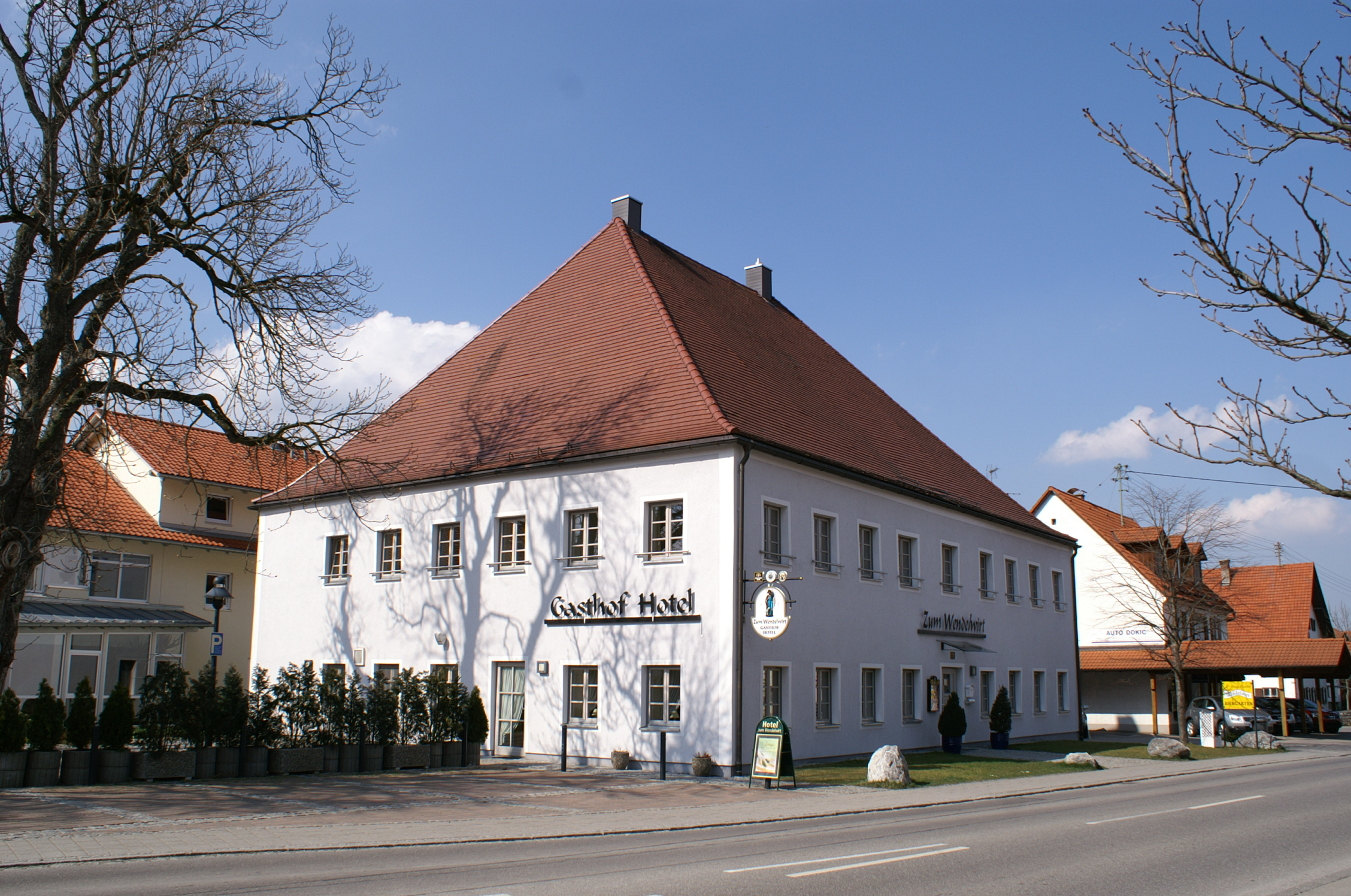 Gasthof Wendelwirt in Obergermaringen, Germaringen